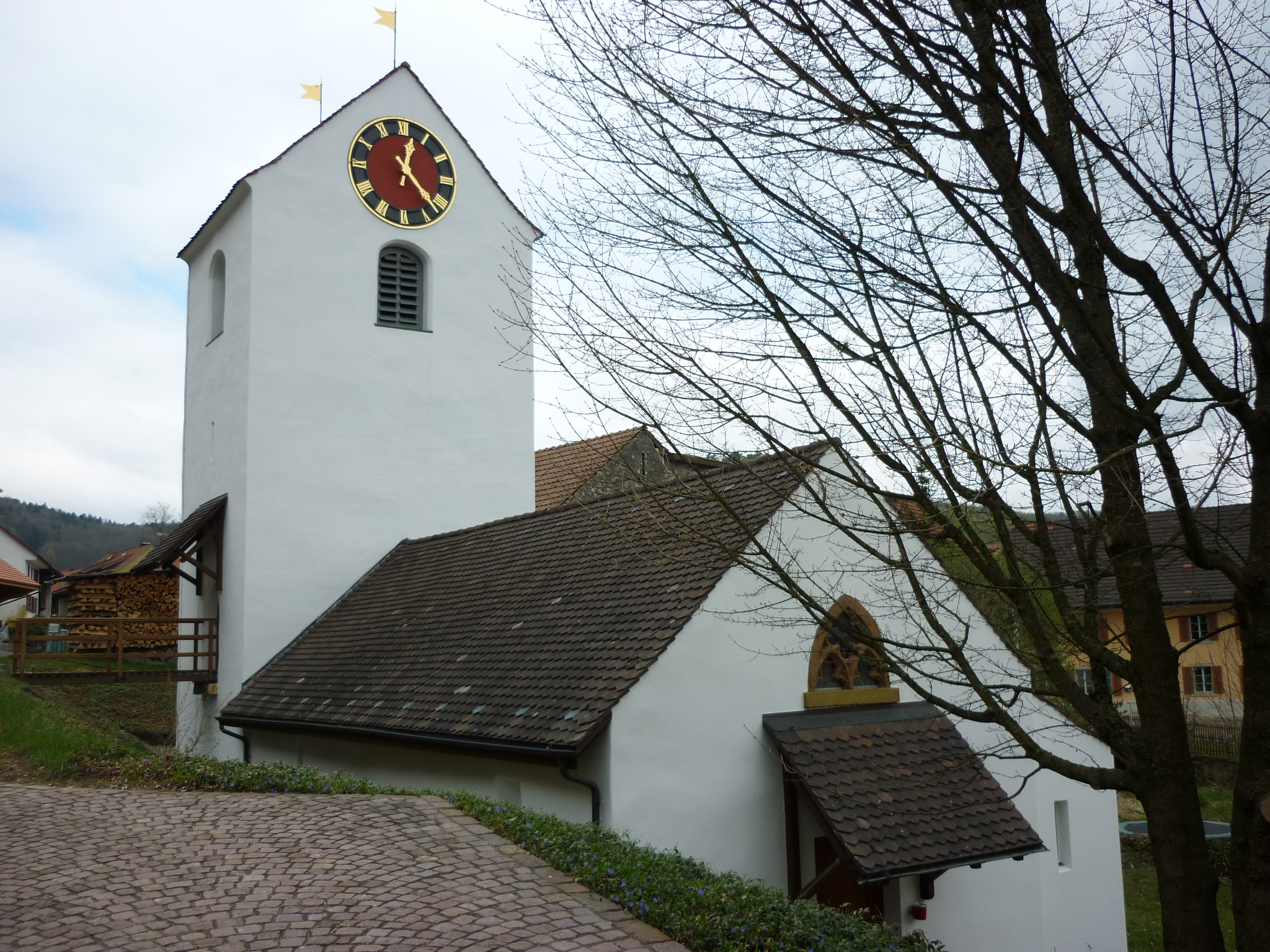 Reformierte Kirche Villigen AG, Schweiz